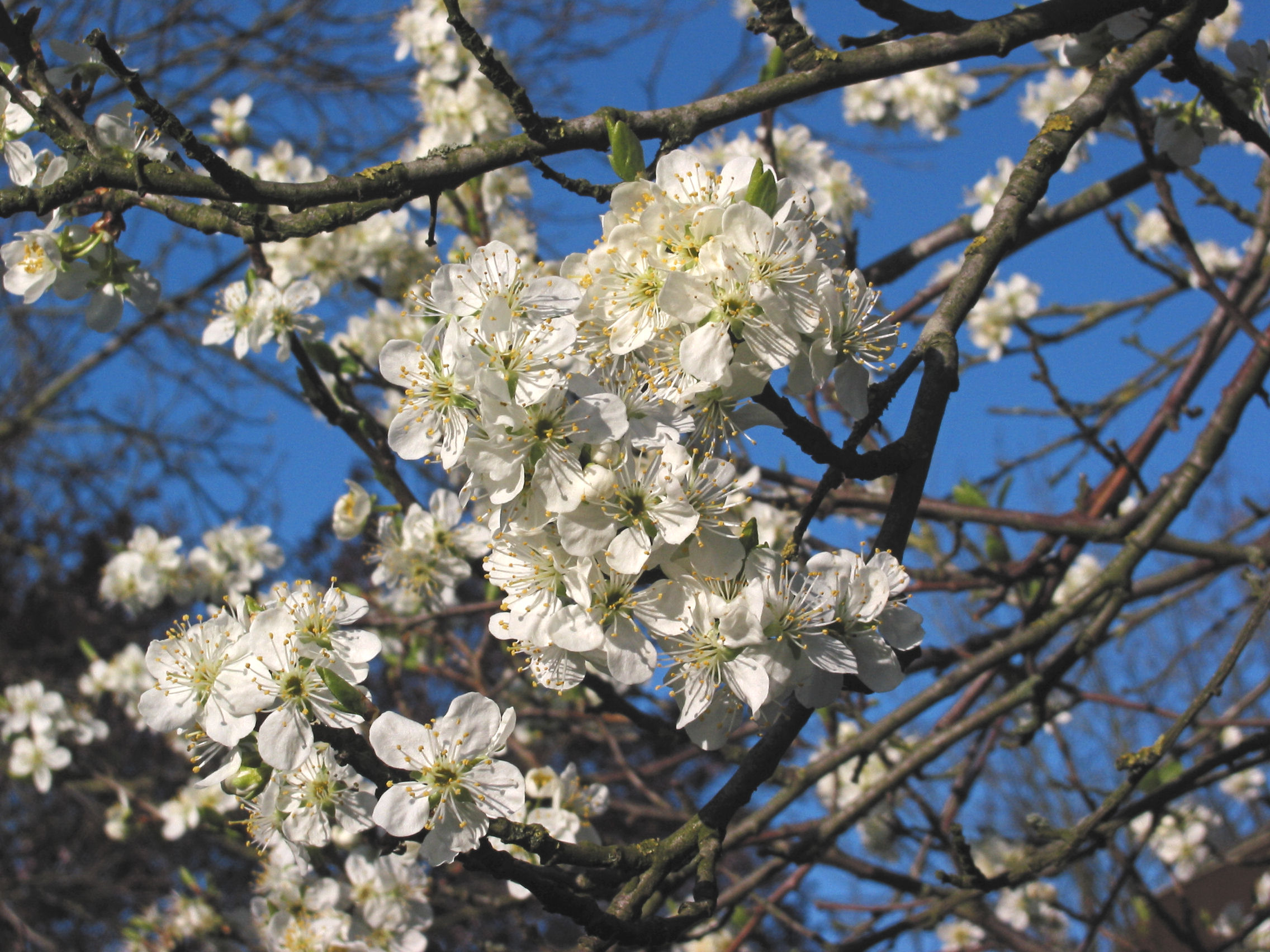 (nl: Pruimenbloesem Opal) Prunus domestica flowers 'Opal'